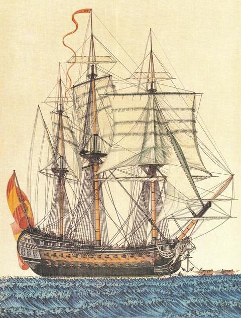 Navío San Telmo de la Armada Española, realizado por Alejo Berlinguero (1750-1810), museo naval de Madrid